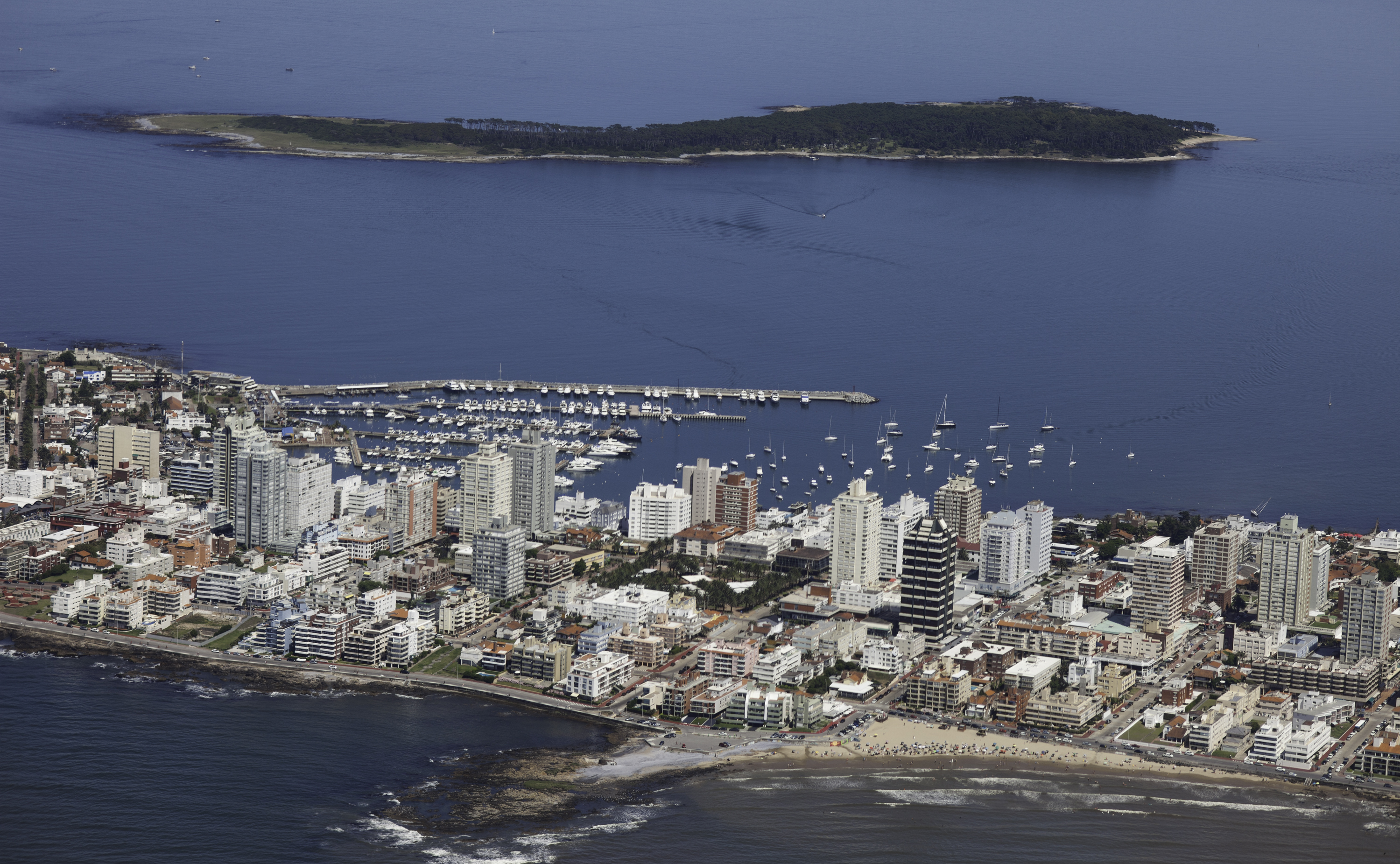 Vista aérea de Punta del este